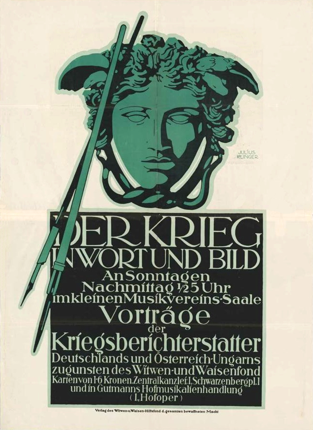 Plakat zur Wiener Vortragsreihe "Der Krieg in Wort und Bild".